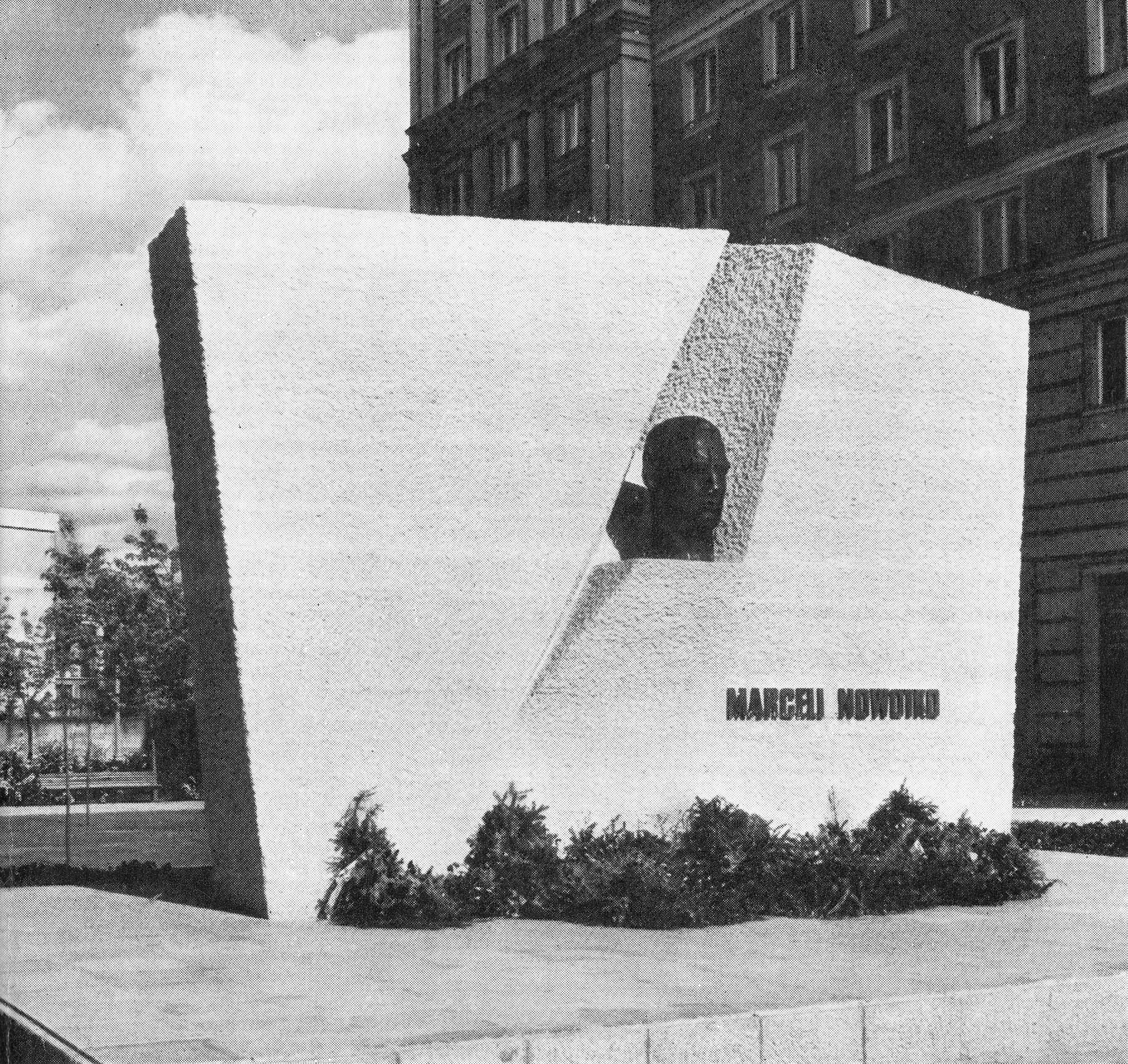 Pomnik Marcelego Nowotki przy ul. Marcelego Nowotki (obecnie ul. gen. Wł. Andersa) w Warszawie